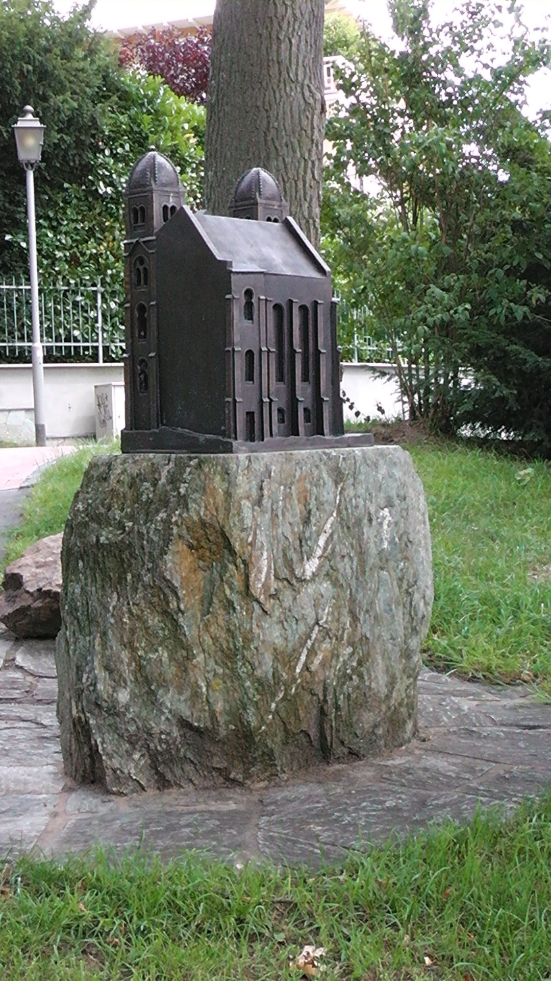 Ansicht des Denkmals zur Erinnerung an die ehemalige Synagoge in Königstein im Taunus (1906- Pogromnacht 1938). Das Denkmal ist ein in Bronze gegossenes vollplastisches Modell der Synagoge, das 1996 zum Gedenken an die vor 100 Jahren erbaute Synagoge aufgestellt wurde. Im Sockelbereich ist eine Gedenktafel für die ehemaligen jüdischen Bürger der Stadt angebracht.